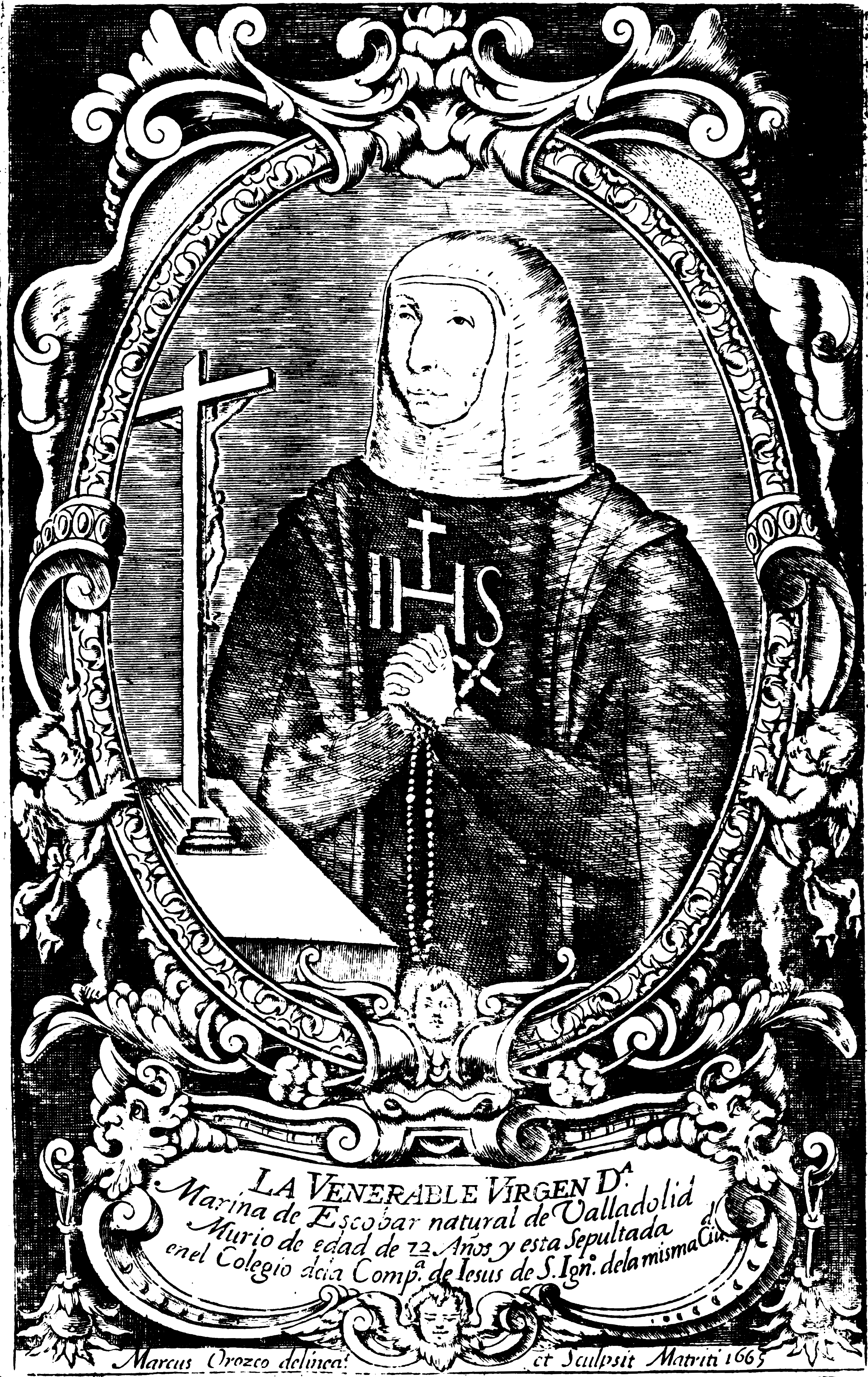 Ilustración de la venerable Marina de Escobar en las primeras páginas del libro Vida maravillosa de la Venerable virgen doña Marina de Escobar (2.ª parte), de Luis de la Puente, publicado en Madrid en 1673. Grabado de Marcos Orozco, dibujado en 1665 según su propia firma.